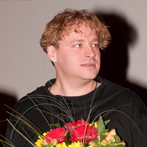 Алексей Барабаш на премьере фильма «Мы из будущего 2» в кинотеатре «Октябрь»